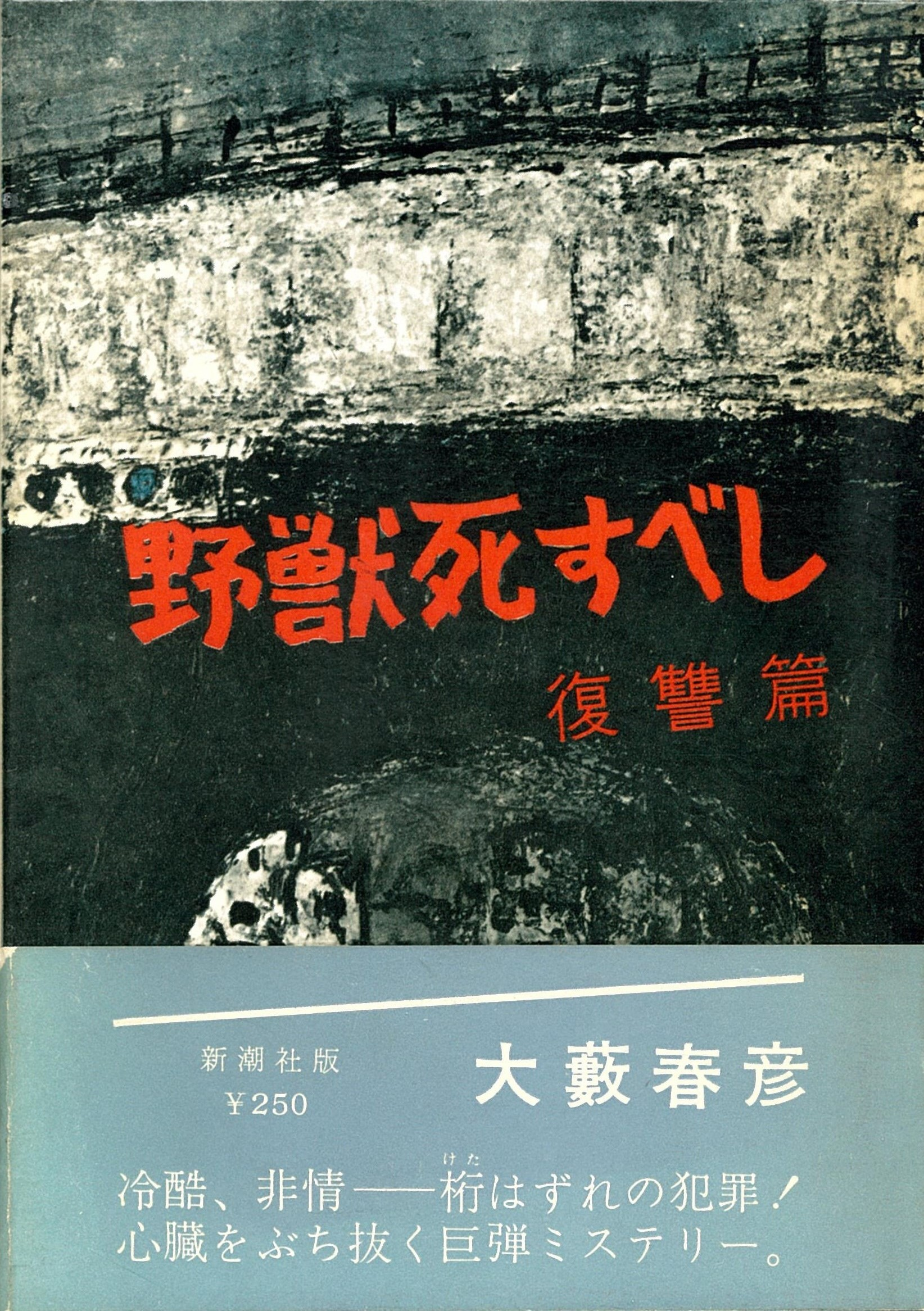 大藪春彦『野獣死すべし 復讐篇』1960年初版 新潮社（函絵：松山恒太郎 カット：皆川知七 挿絵：斎藤三郎）